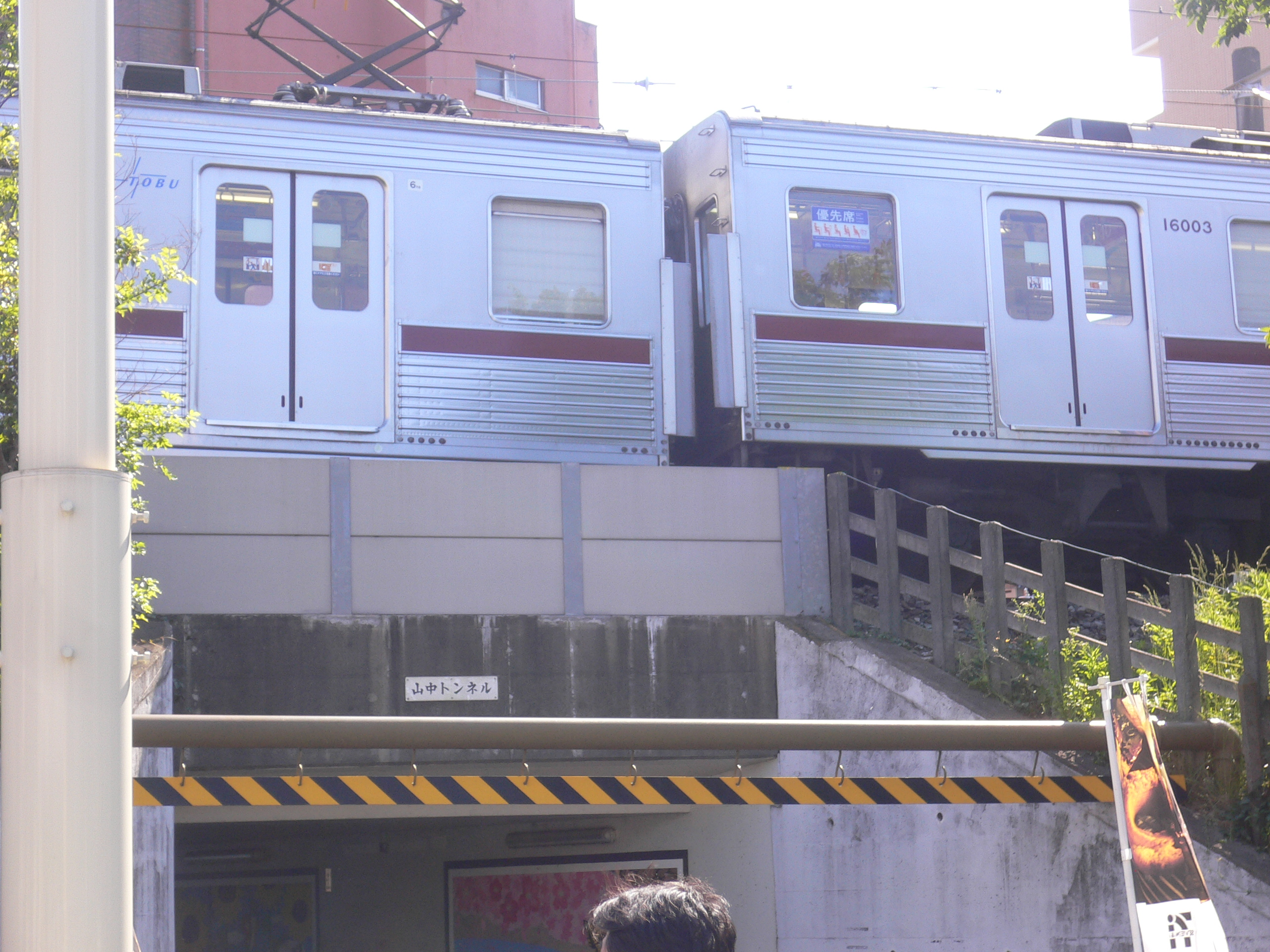 東京都板橋区で発生。